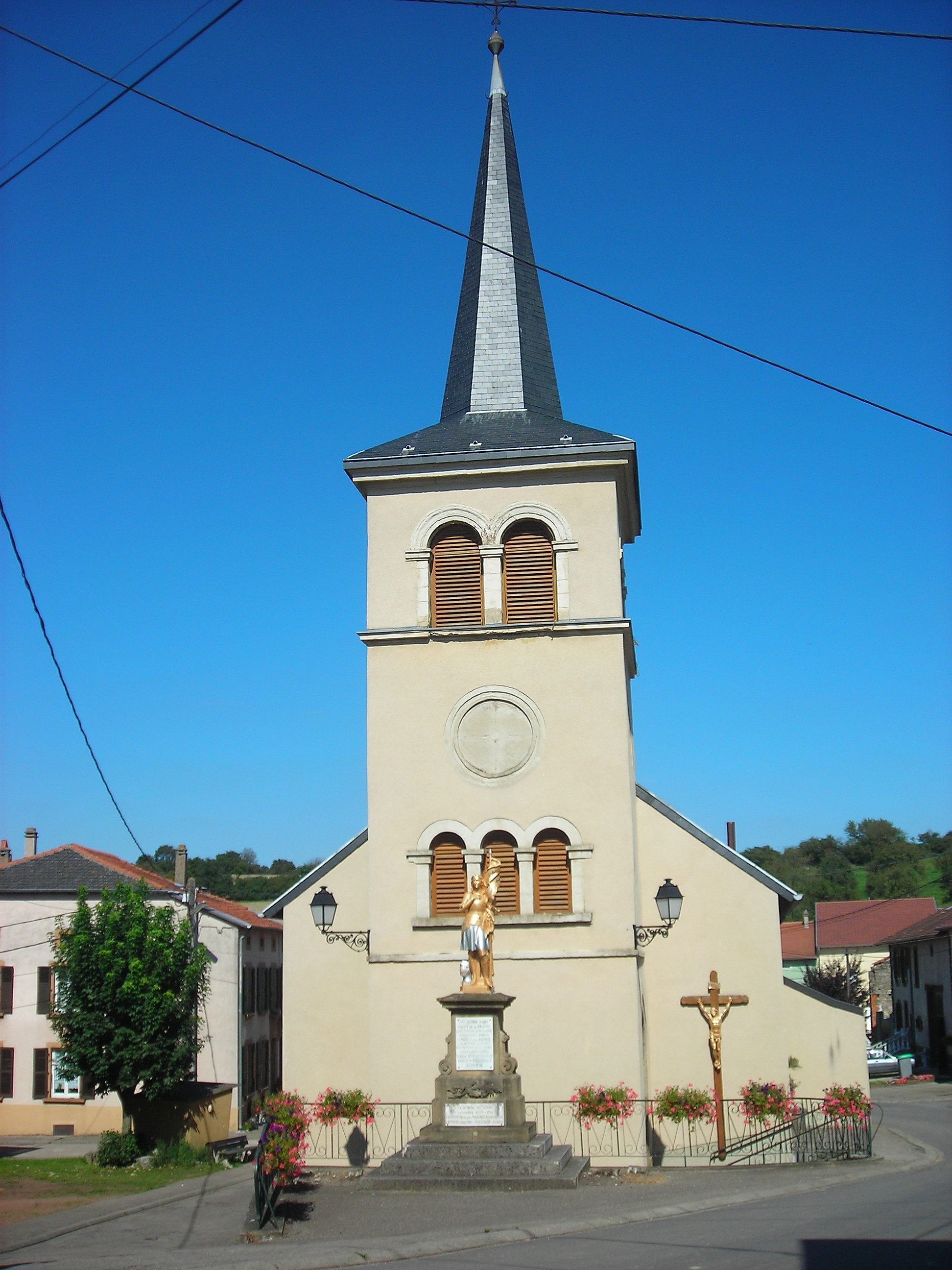 Eglise d'Obervisse (Moselle, France)